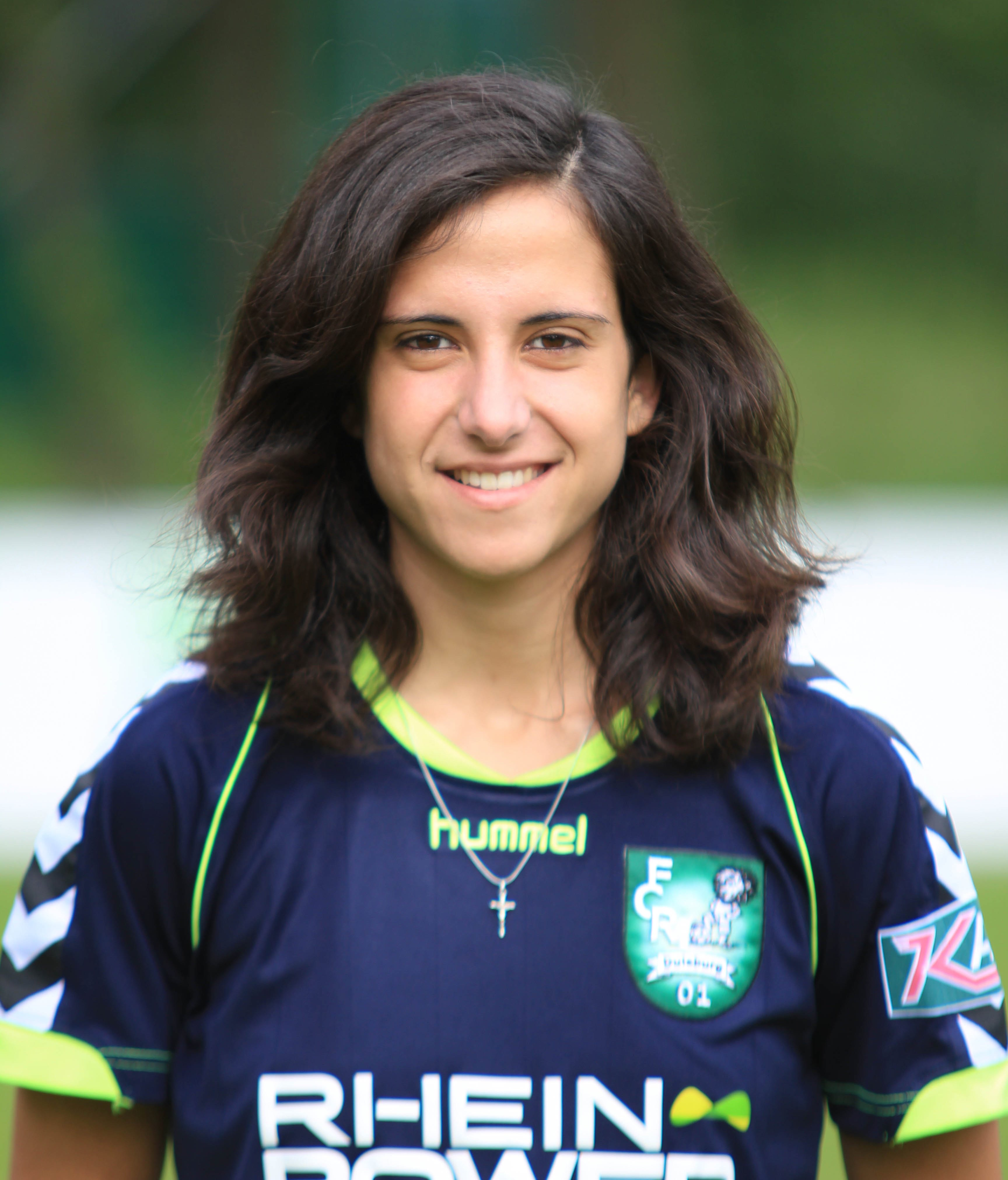 Dolores Isabel Jacome Silva, FCR 2001 Duisburg